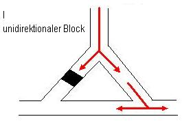 unidirektionaler Block einer kreisenden Erregung am Herzen, Vorlage aus EKG-Kurs für Isabel Hans-Peter Schuster/Hans-Joachim Trappe